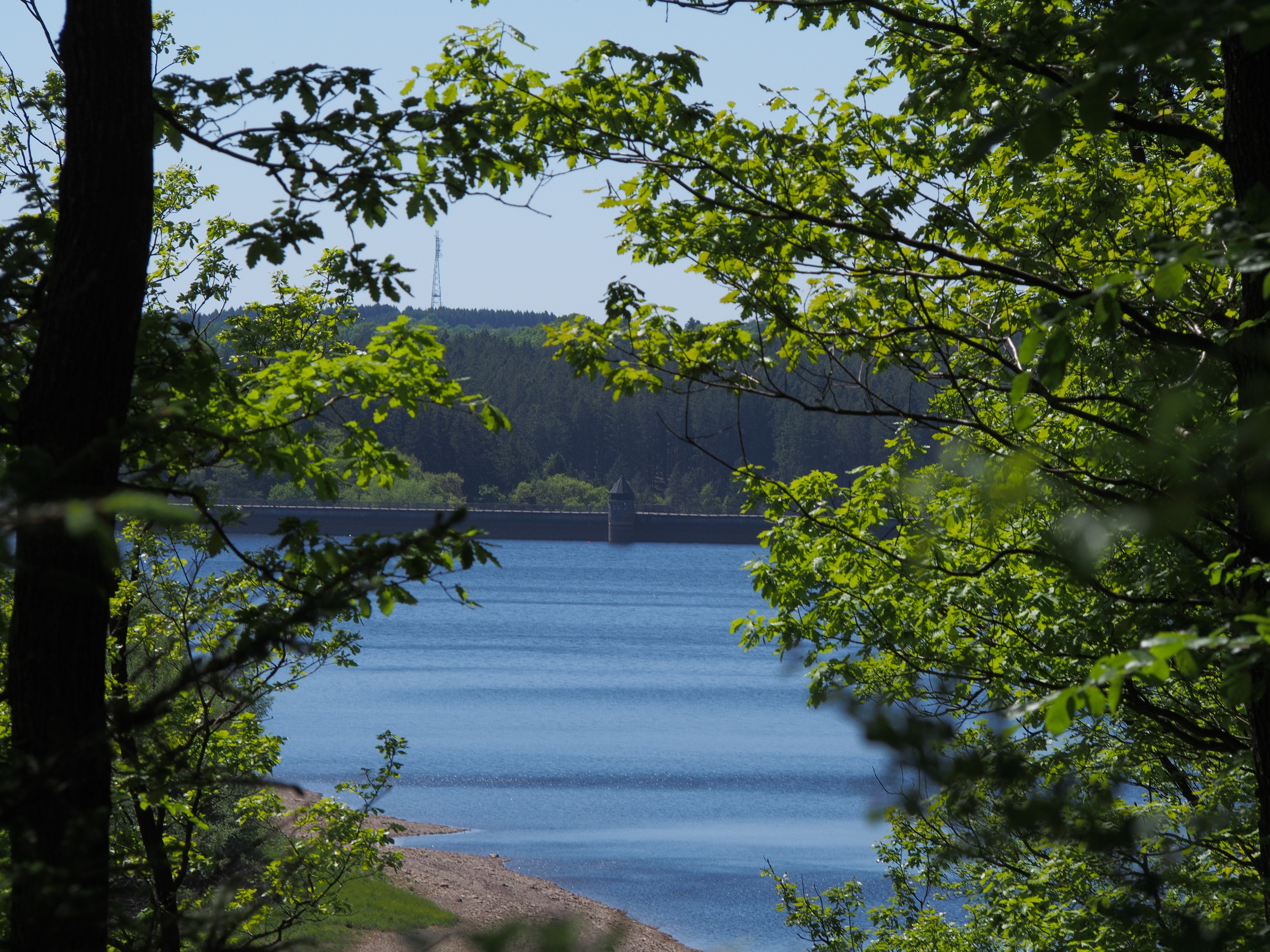 Die Dreilägerbach-Talsperre in Roetgen versorgt die Stadt Aachen mit Drinkwasser